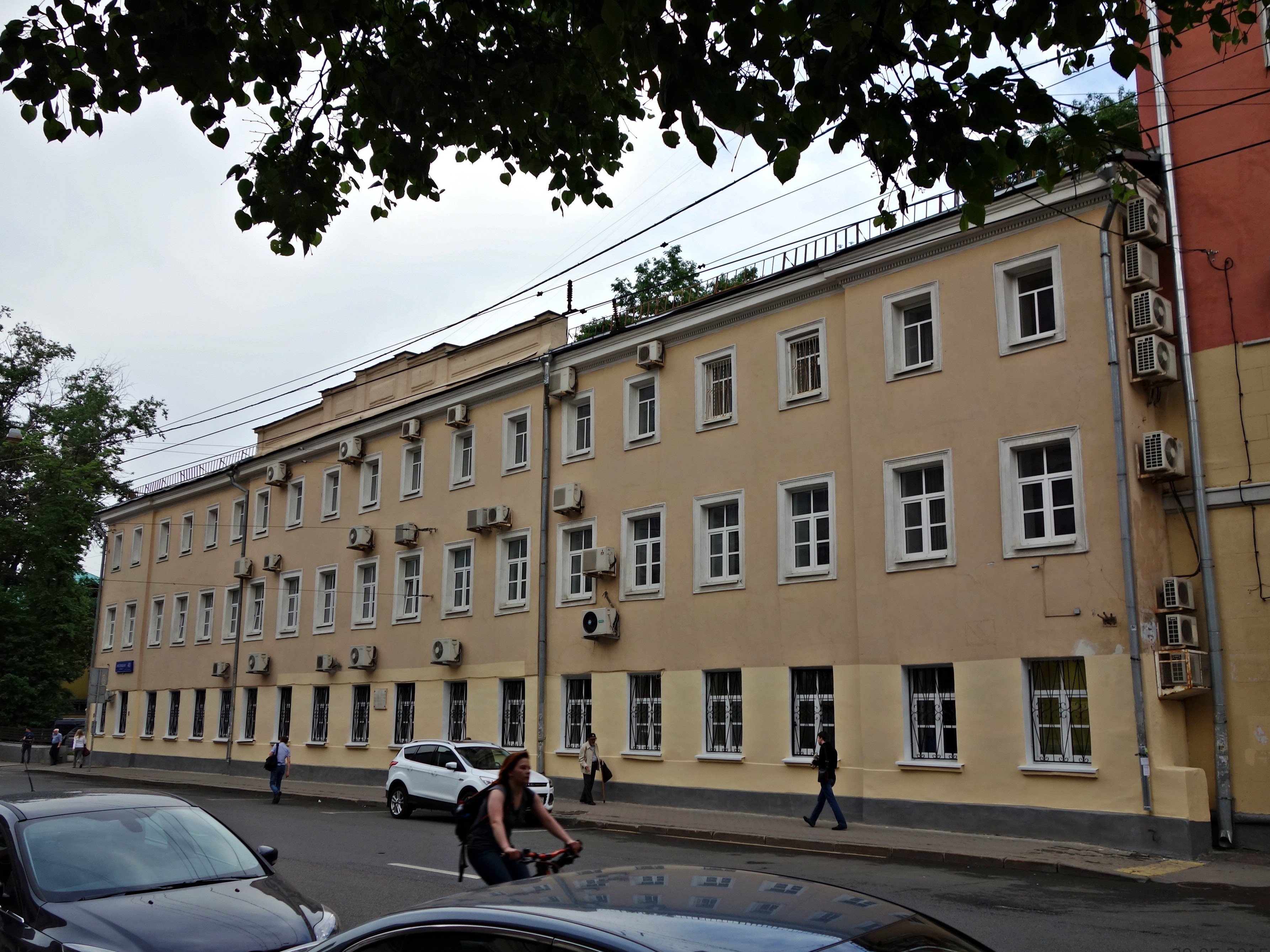 Главный корпус (главный дом усадьбы): Мясницкая ул., дом 40, строение 1, Басманный, Центральный округ, Москва